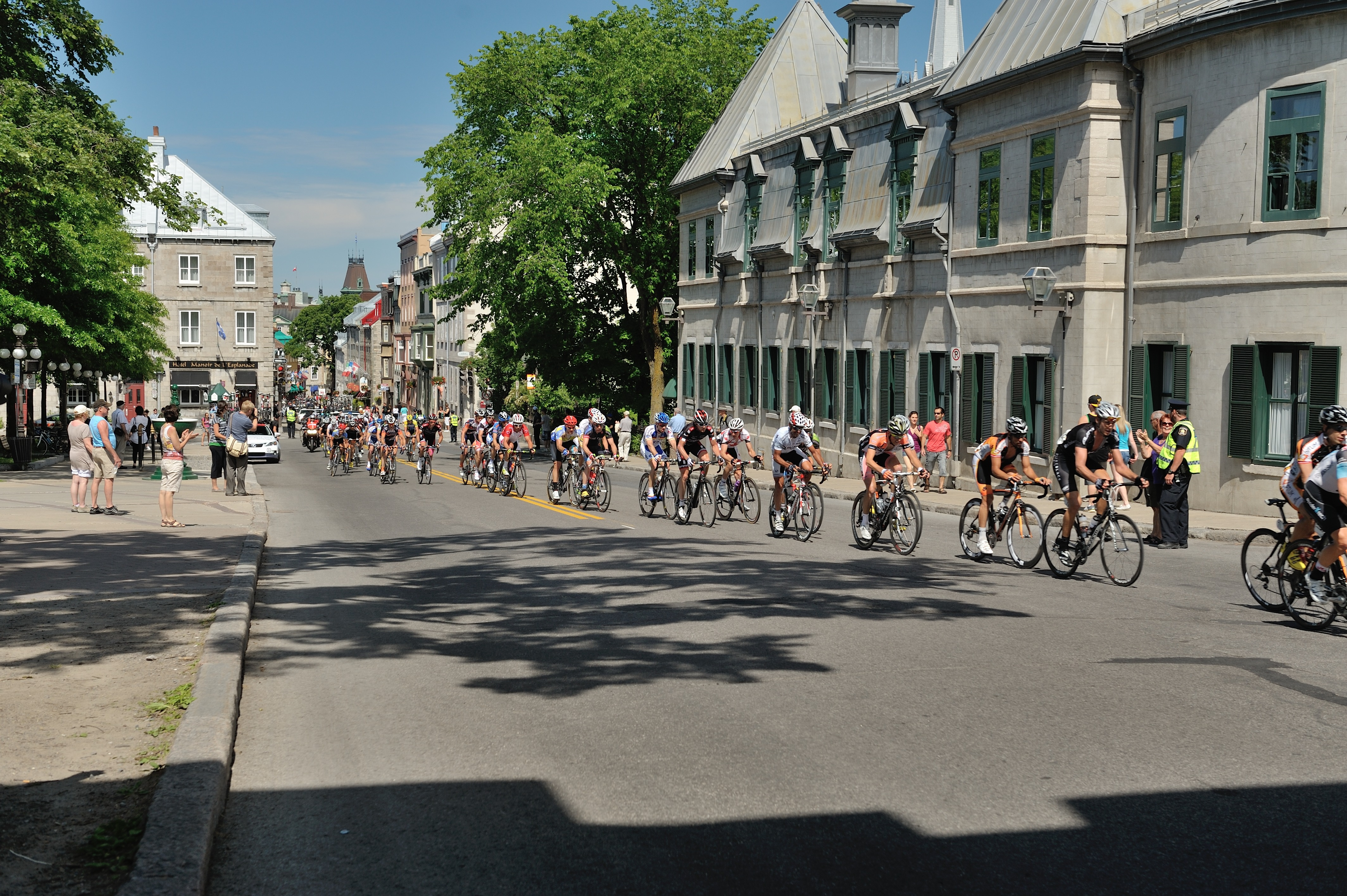 Cyclistes participant à la 5e étape du Tour de Beauce dans les rues de Québec près de la porte Saint-Louis (coin Saint-Louis et d'Autreuil). L'évènement a eu lieu samedi le 16 juin 2012.